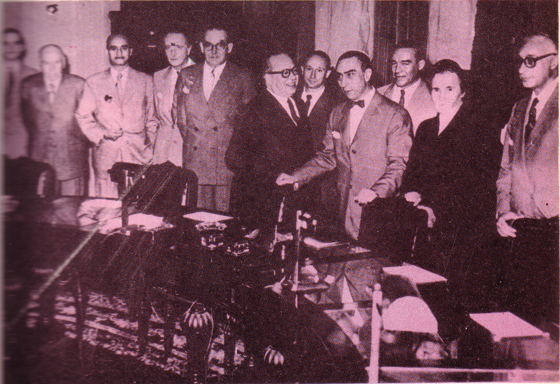 Primera reunión de la Junta Consultiva de la Revolución Libertadora. First meeting of the Advisory Junta of the Revolución Libertadora. In the picture: Oscar Alende, Alicia Moreau de Justo, Miguel Angel Zavala Ortiz, Isaac Rojas entre otros.